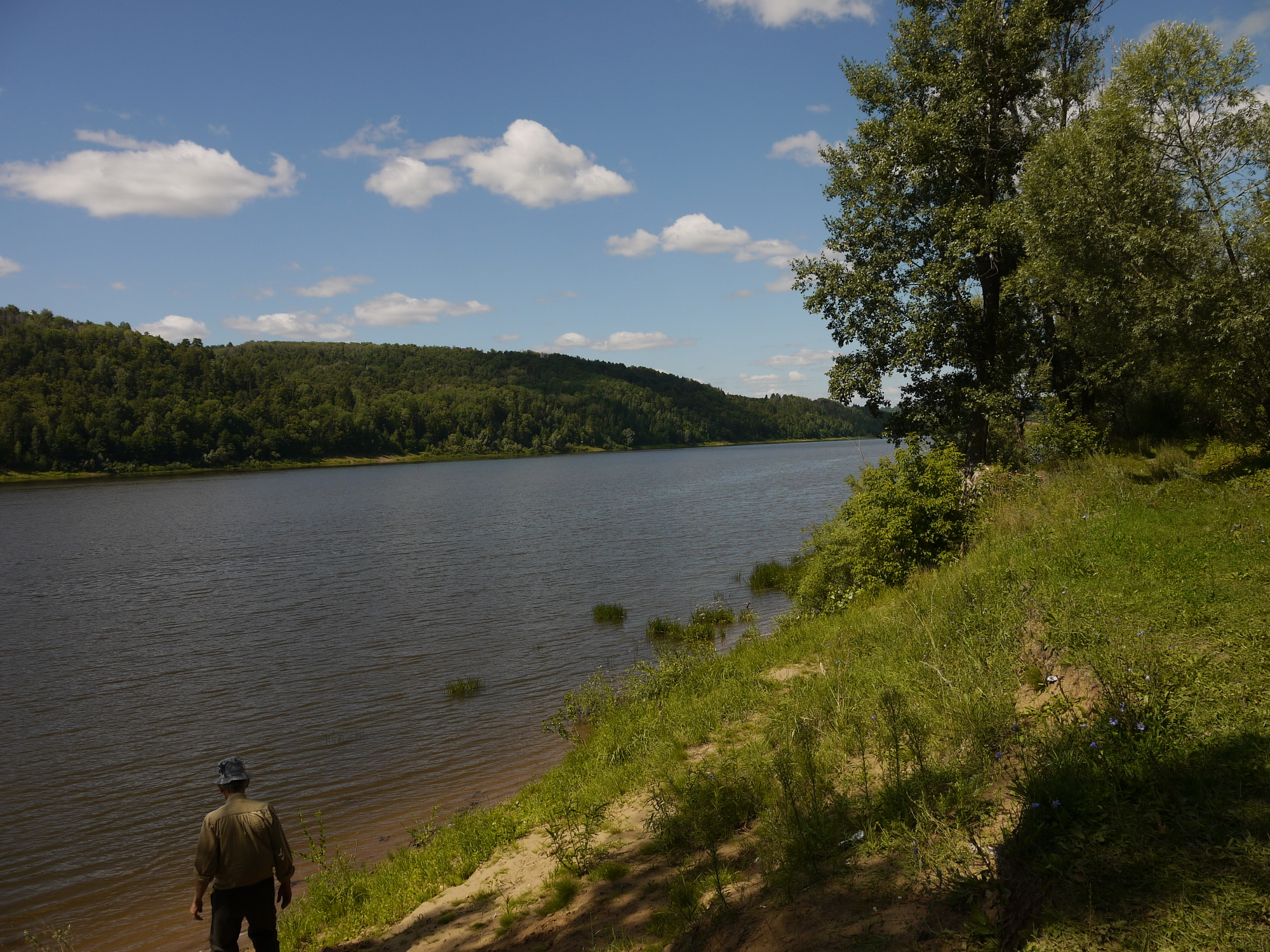 Kiznerskiy r-n, Udmurtskaja Respublika, Russia